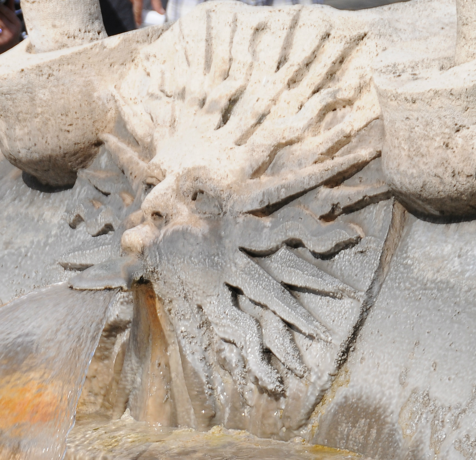 Dettaglio della Fontana della Barcaccia di Pietro Bernini raffigurante il Sole, uno dei simboli araldici dei Barberini. La fontana di Piazza di Spagna (Roma) fu infatti commissionata dal papa Urbano VIII, al secolo Maffeo Barberini